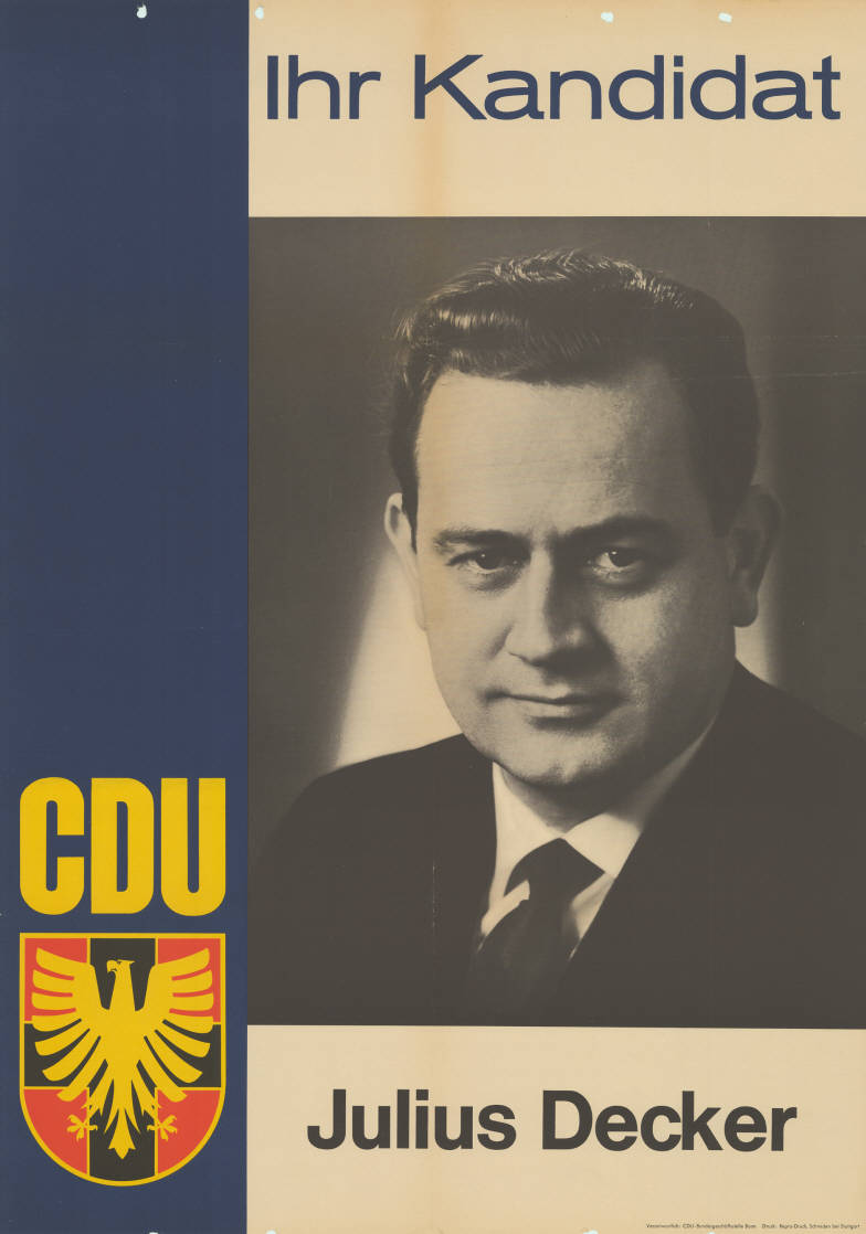 Ihr Kandidat CDU Julius Decker Abbildung: Porträtfoto Kommentar: Rückseitig farbig beschriftet Plakatart: Kandidaten-/Personenplakat mit Porträt Auftraggeber: Verantw.: CDU-Bundesgeschäftsstelle Bonn Drucker_Druckart_Druckort: Repro-Druck, Schmiden bei Stuttgart Objekt-Signatur: 10-010 : 201 Bestand: Landtagswahlplakate Rheinland-Pfalz (10-010) GliederungBestand10-18: Landtagswahlplakate Rheinland-Pfalz (10-010) » CDU Lizenz: KAS/ACDP 10-010 : 201 CC-BY-SA 3.0 DE